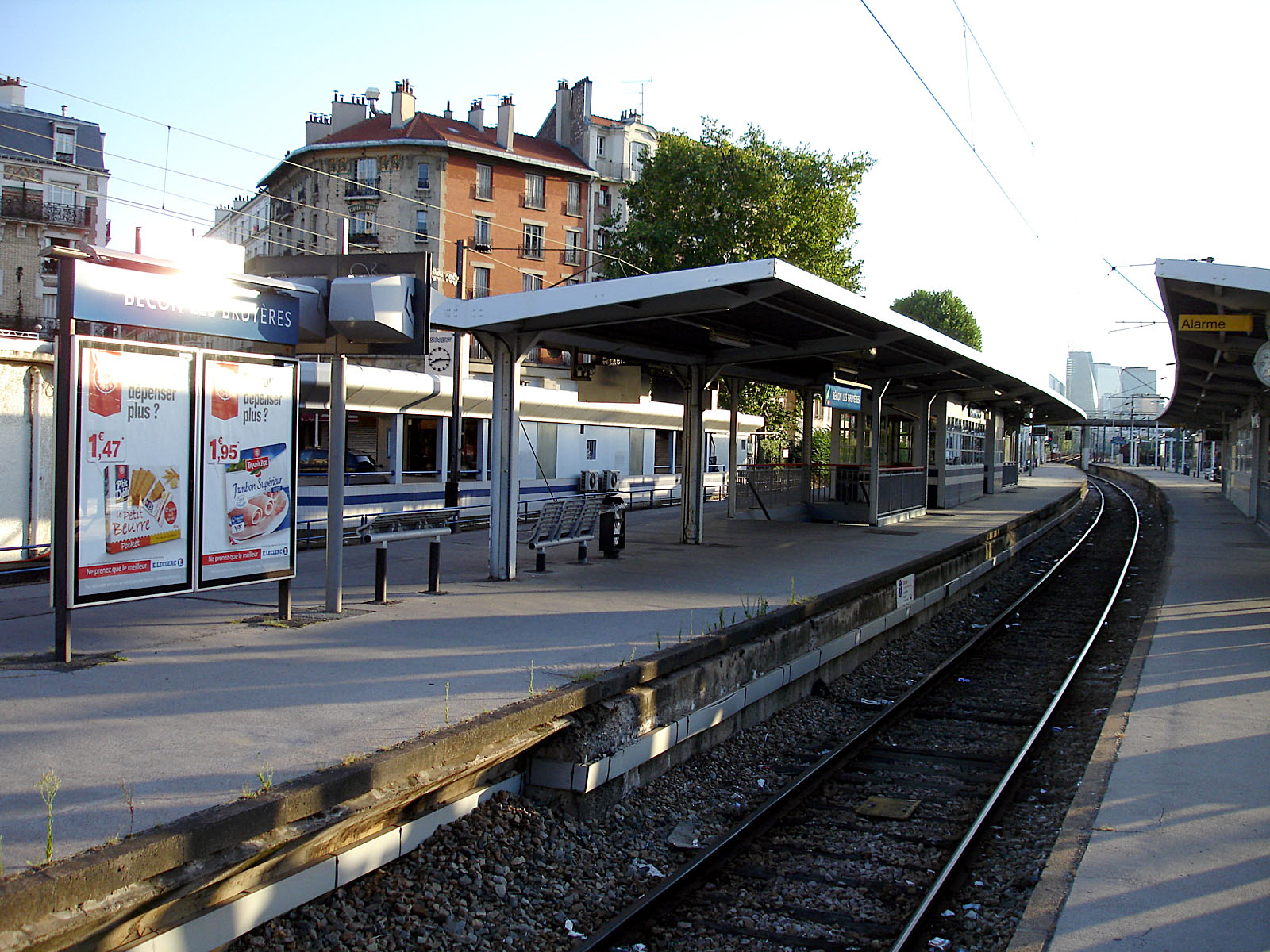 Voie centrale du groupe II de la gare de Bécon-les-Bruyères, Hauts-de-Seine, France. Vue en direction de La Défense.